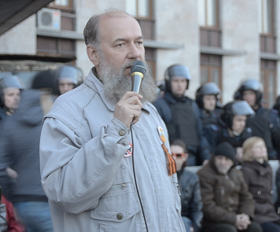 Протесты в Донецке. Владимир Макович